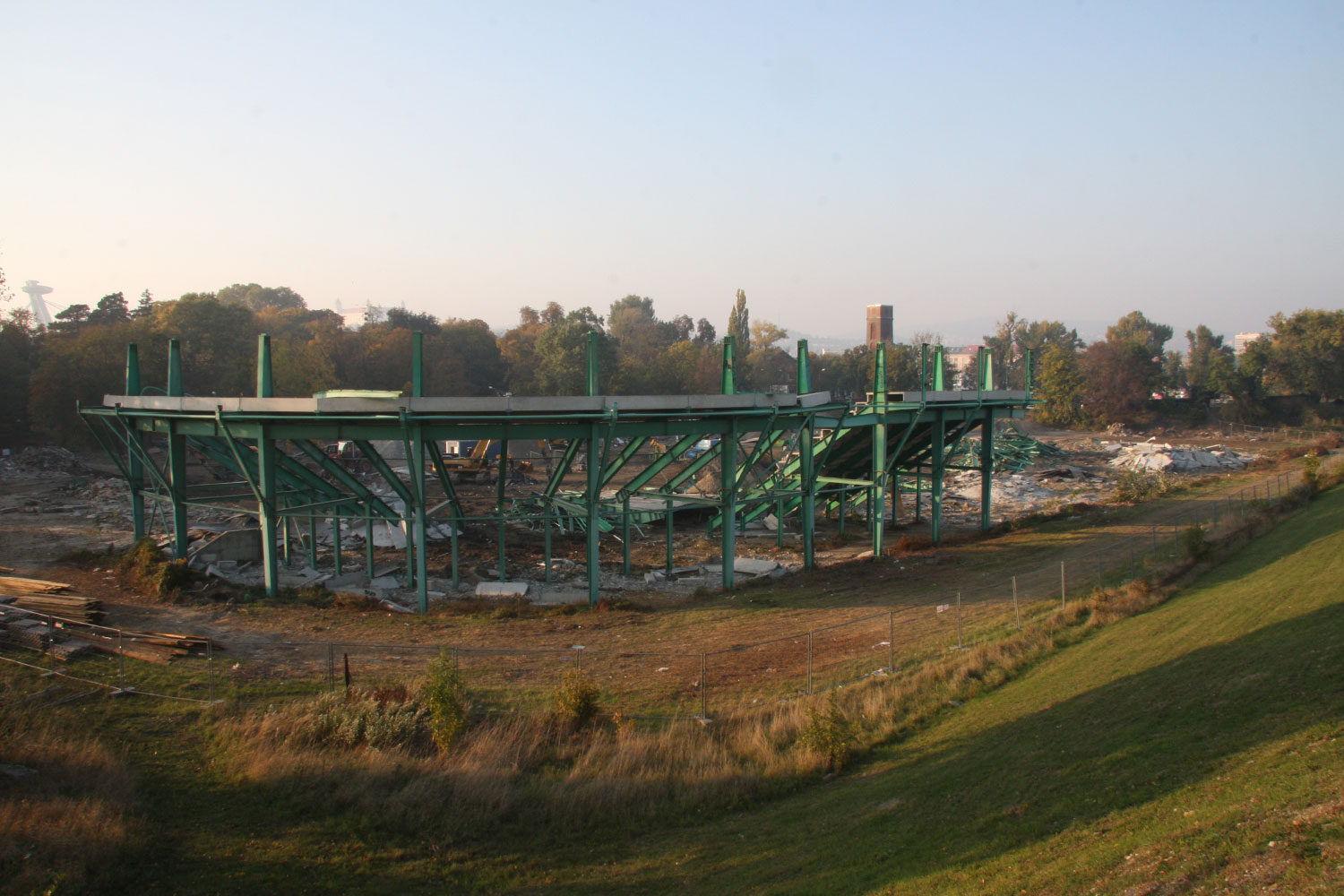 Búranie štadiónu Artmedia Petržalka 21.10.2012